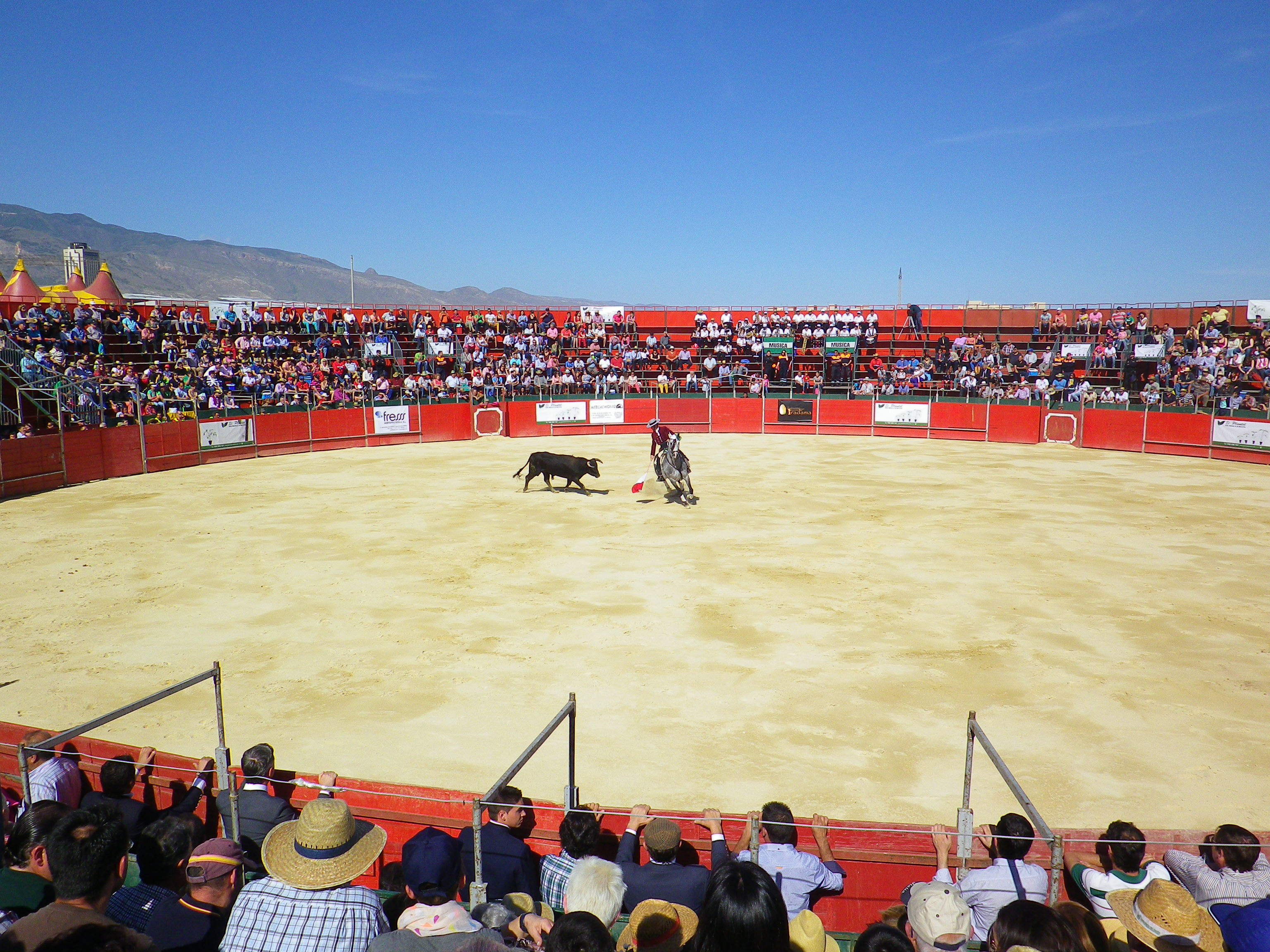 Faena de rejones en la plaza de toros de El Ejido, Almería, fiestas en honor de San Marcos en 2014.